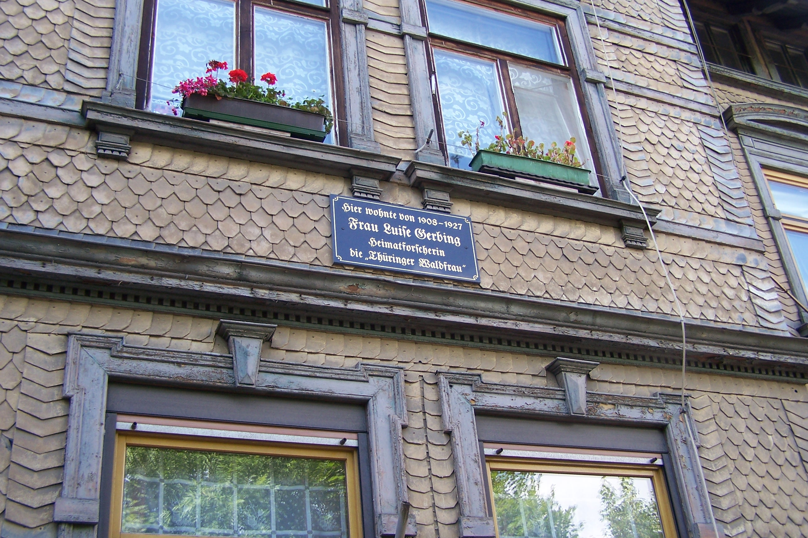 Das Wohnhaus der Heimatforscherin Luise Gerbing in Walterhausen, Rheinhardsbrunner Straße im Stadtteil Rödichen.